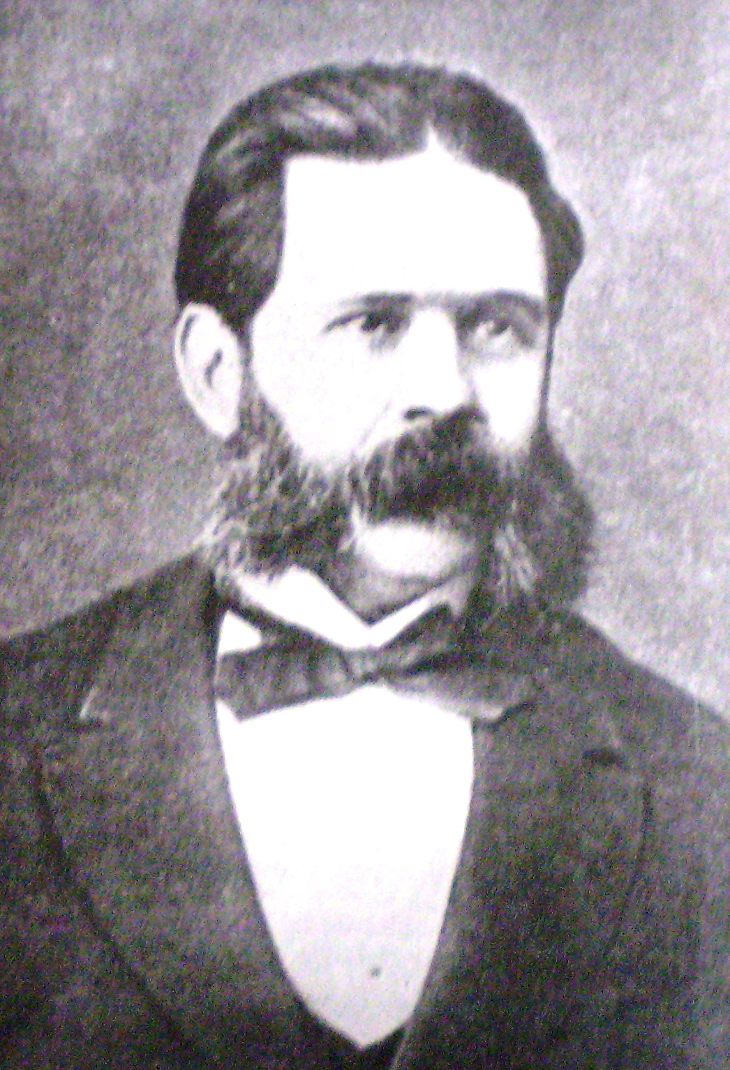 Mariano Acosta